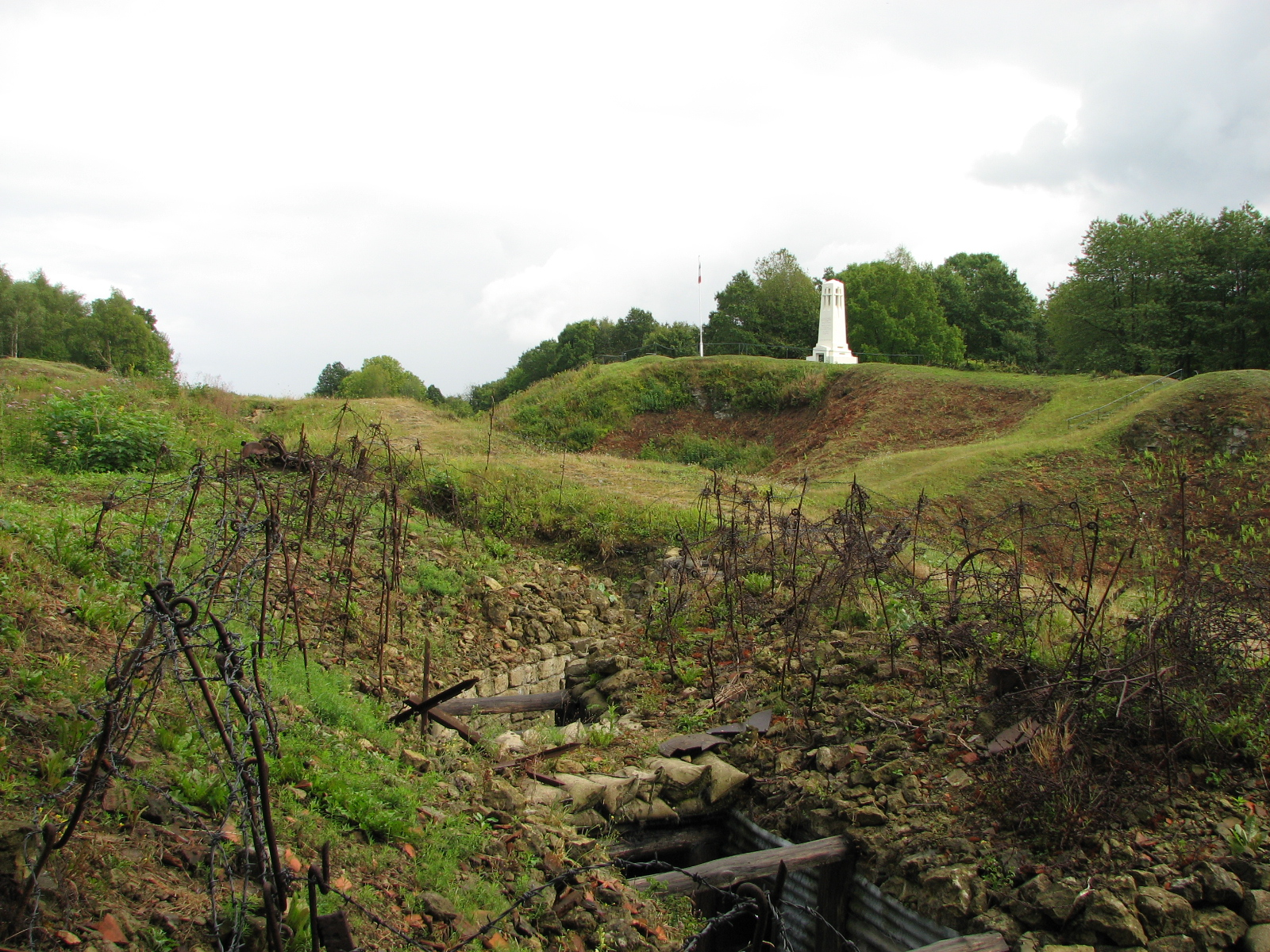 Vue du monument français vu depuis les lignes allemandes sur le sommet de la butte de Vauquois dans la Meuse.